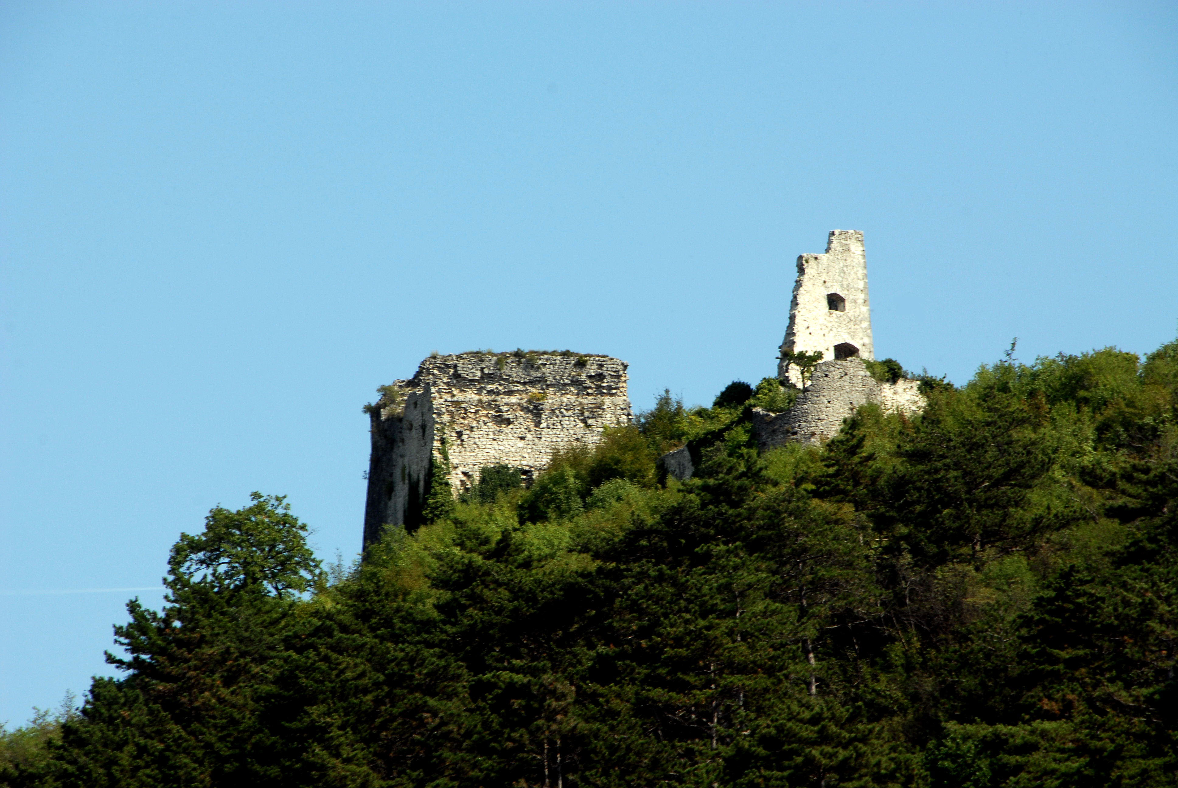 Castle ruin (Stari Grad) in Vipava, Goriska, Slovenia